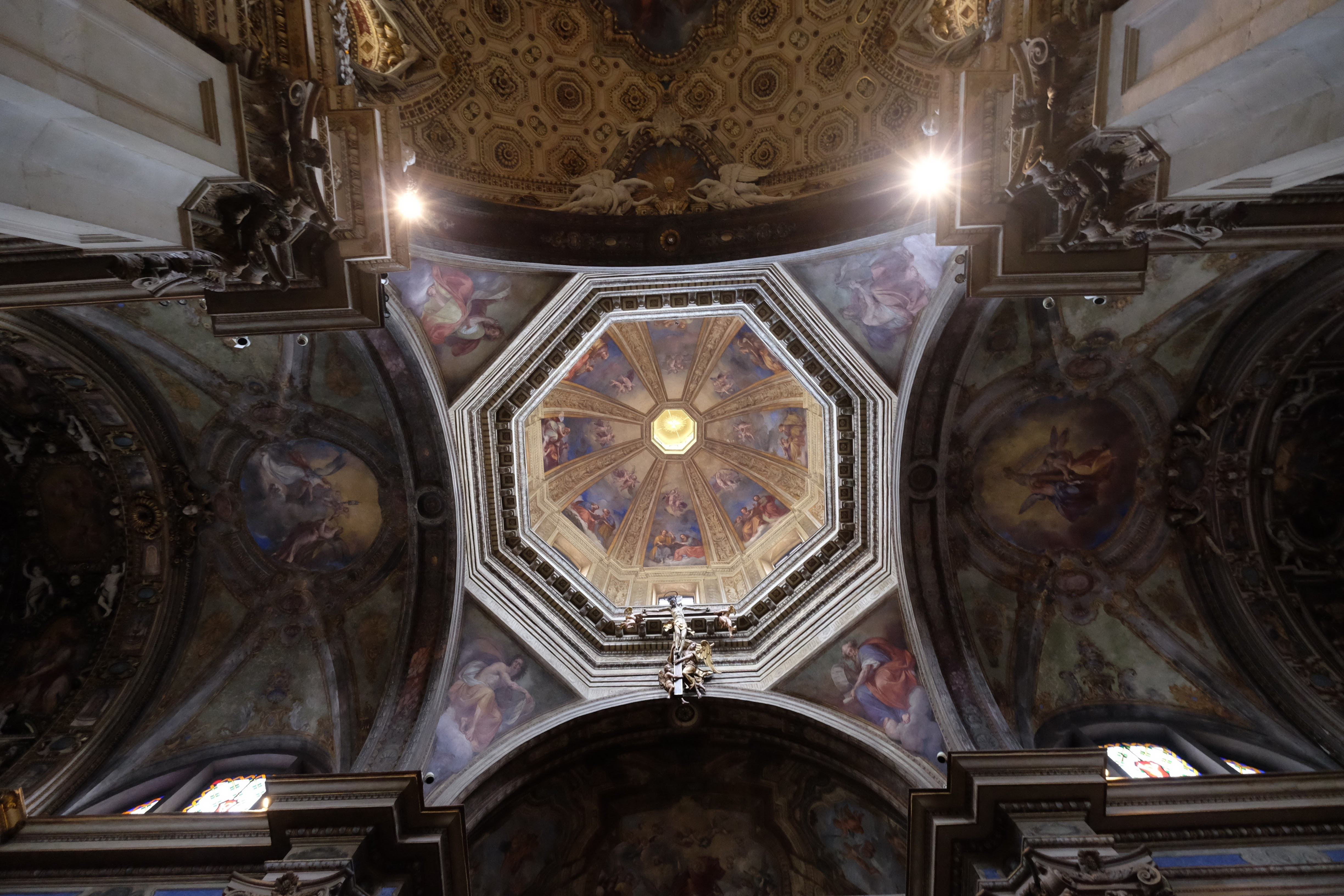 Aggregazione Rionale 1, 21100 Varese VA, Italy